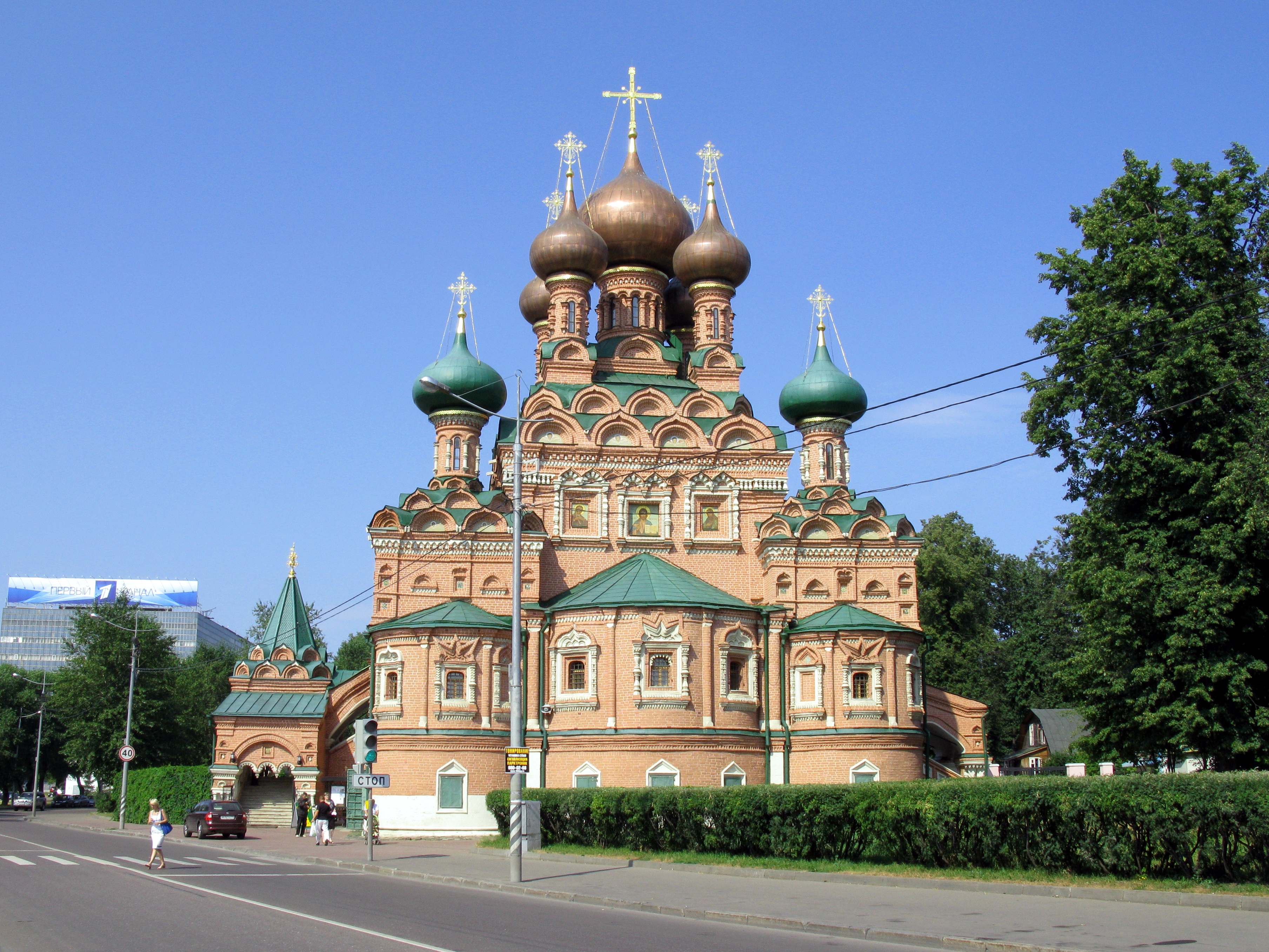 Храм Троицы Живоначальной в Останкине (Москова, ул. 1-ая Останкинская, 7.)